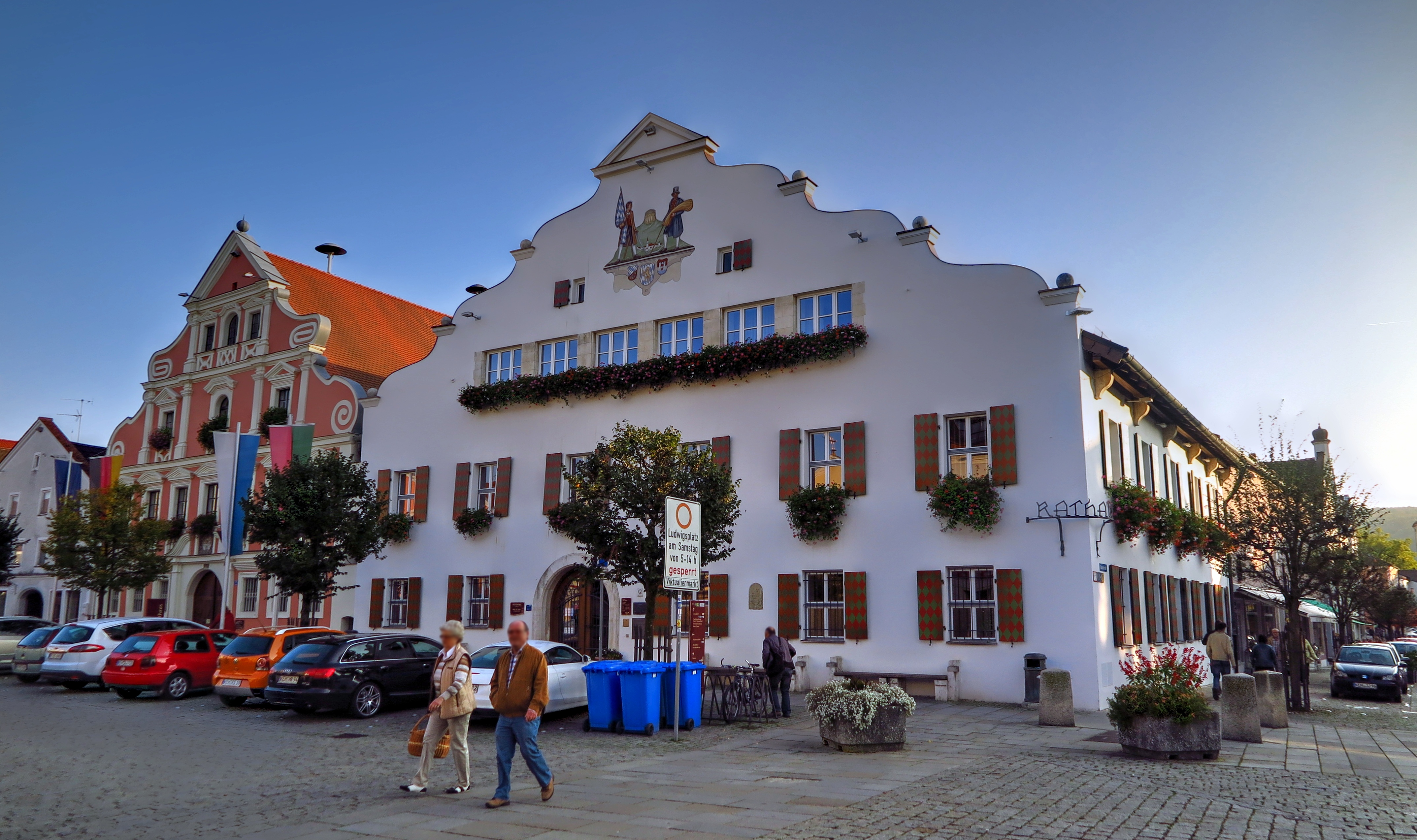 Deutschland, Bayern, Regierungsbezirk Niederbayern, Landkreis Kelheim, Stadt Kelheim, Neues (rechts) und Altes (links) Rathaus